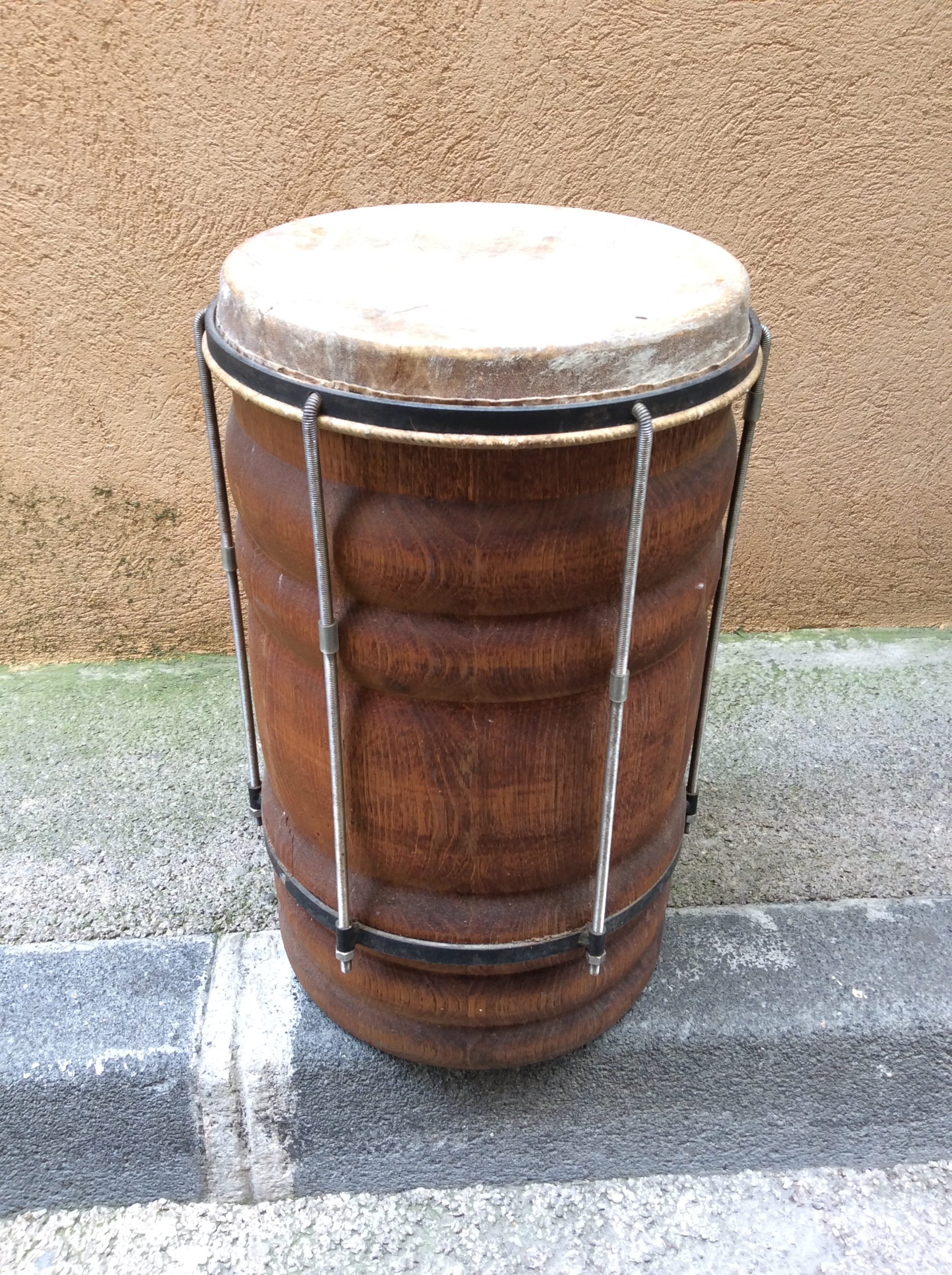 Tambour nyabinghi artisanal, en lamellé collé, tourné, peau de chèvre avec un système de tige fileté pour la tension. Vue de trois quart